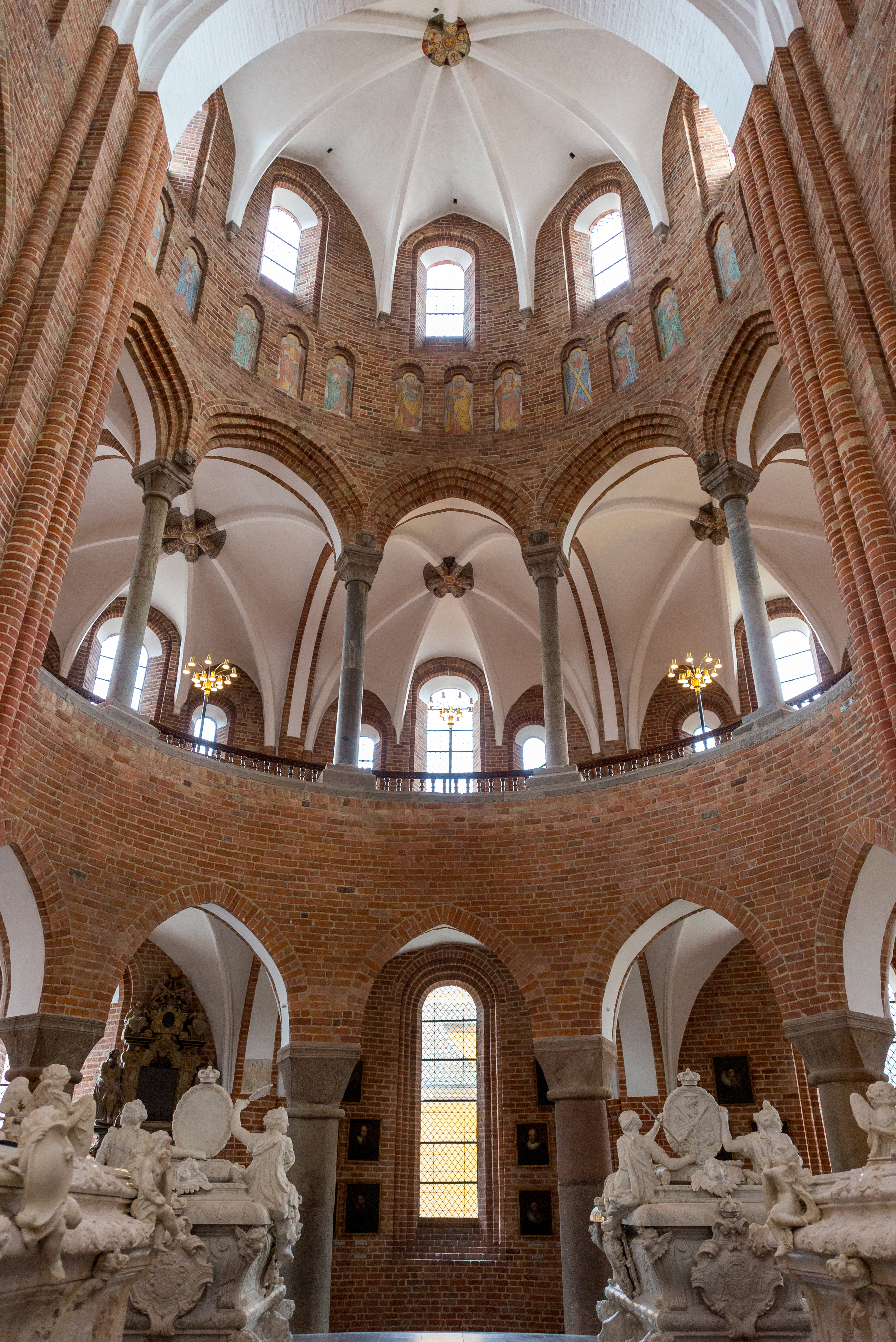 Roskilde domkirke indefra